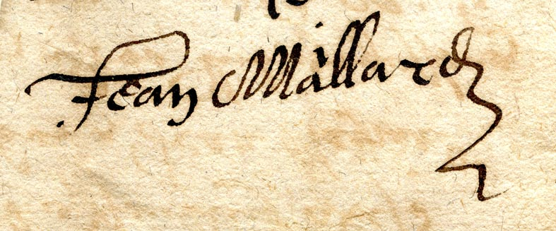 Originalunterschrift des Glockengießers Jean Maillard auf dem Vertrag über die "Friedensglocke" in der Stadtpfarrkirche